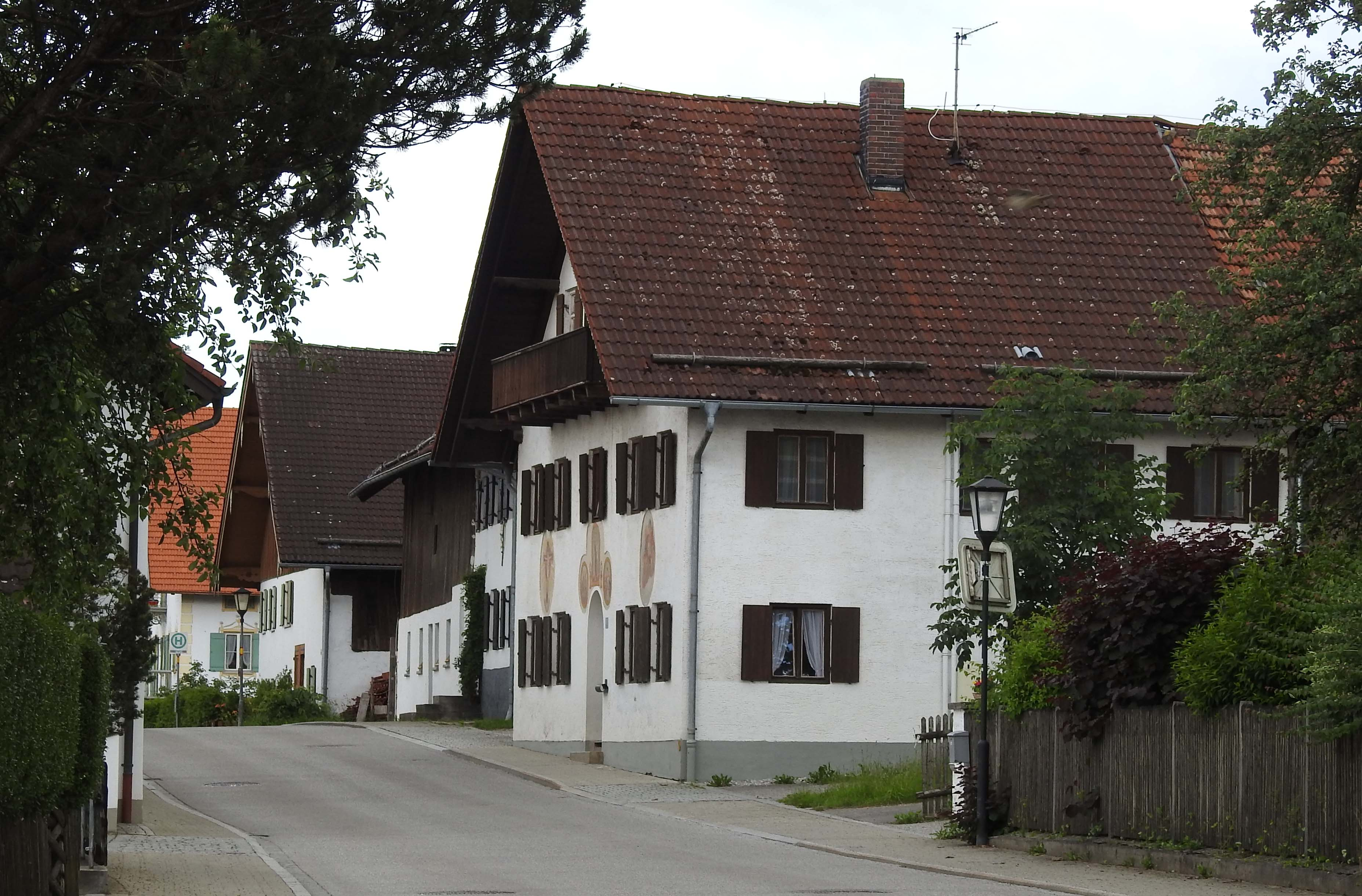 Talstr. in Untereglfing, Eglfing